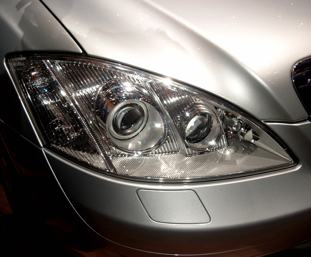 S-Klasse Scheinwerfer auf der IAA 2005 in Frankfurt